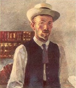 František Gellner autoportrét